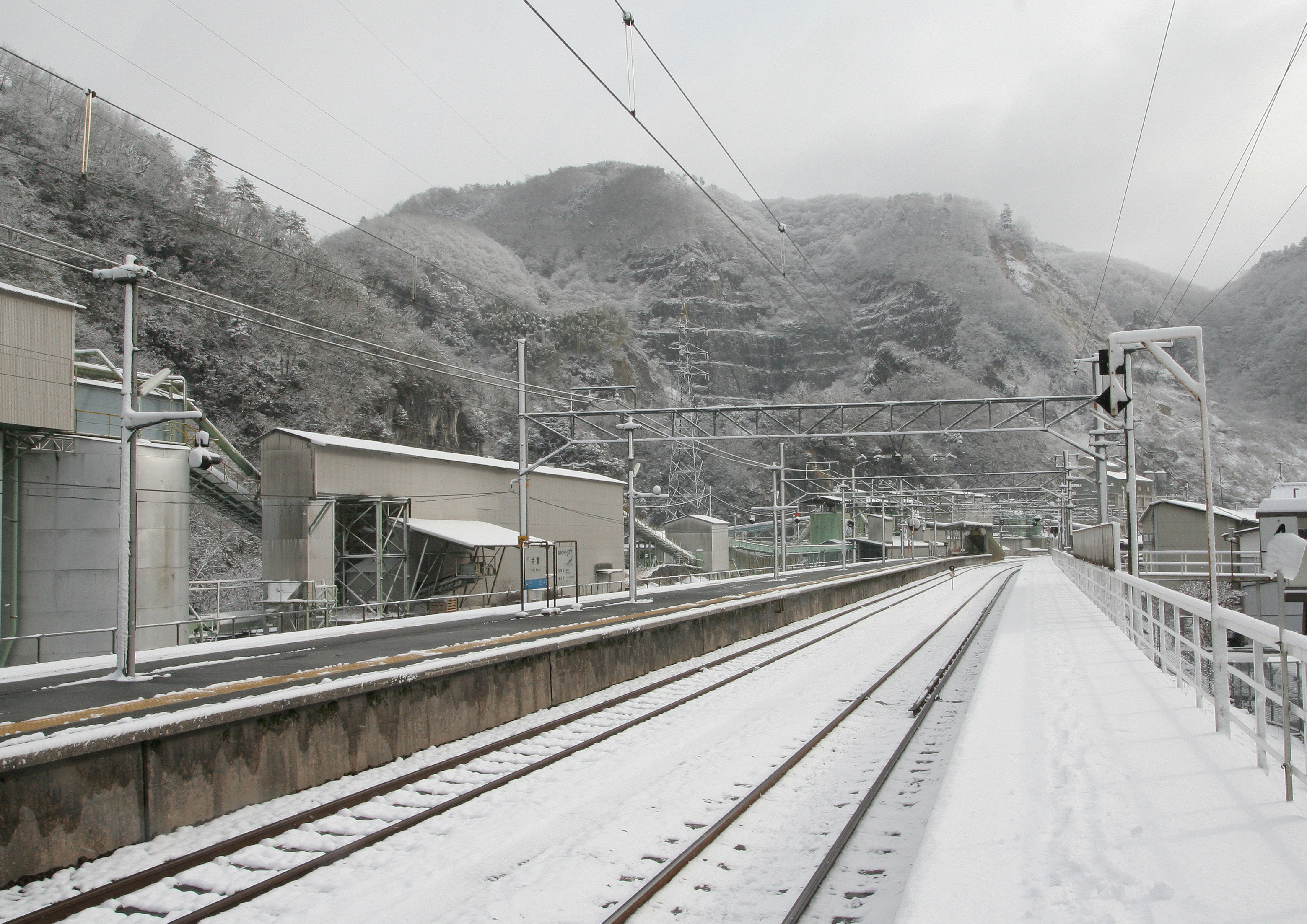 井倉駅の構内